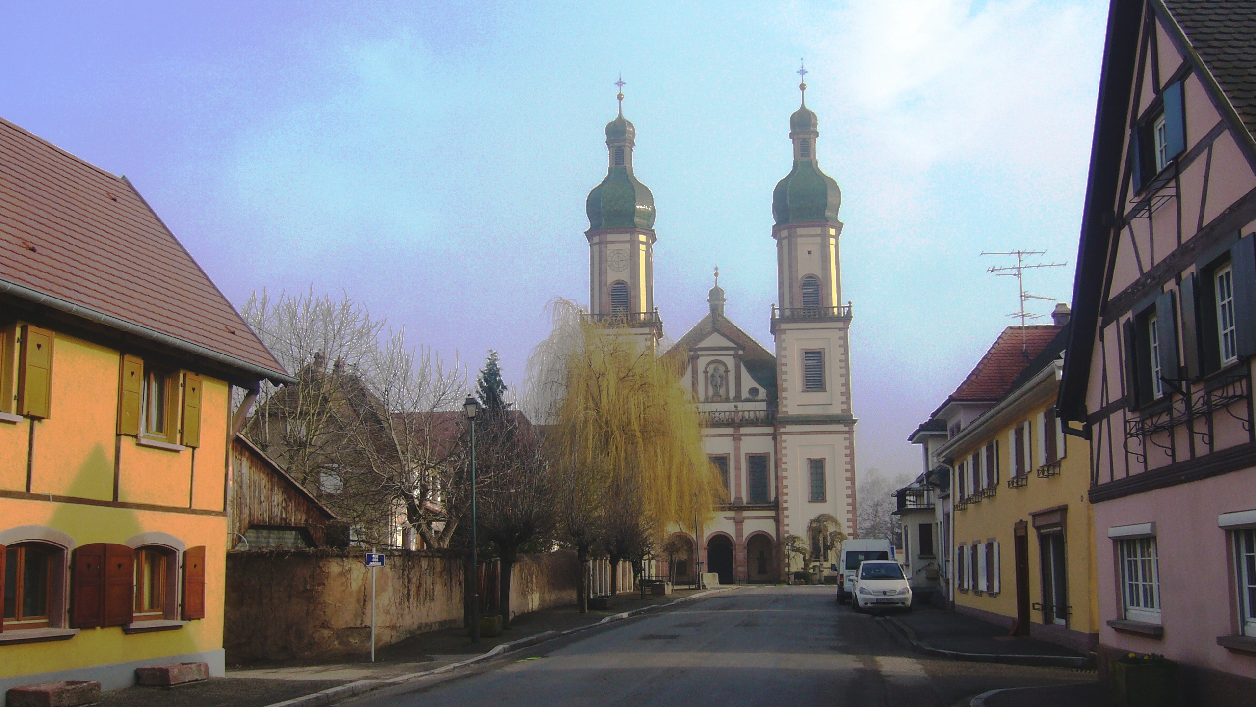 Ebersmunster 002.JPG